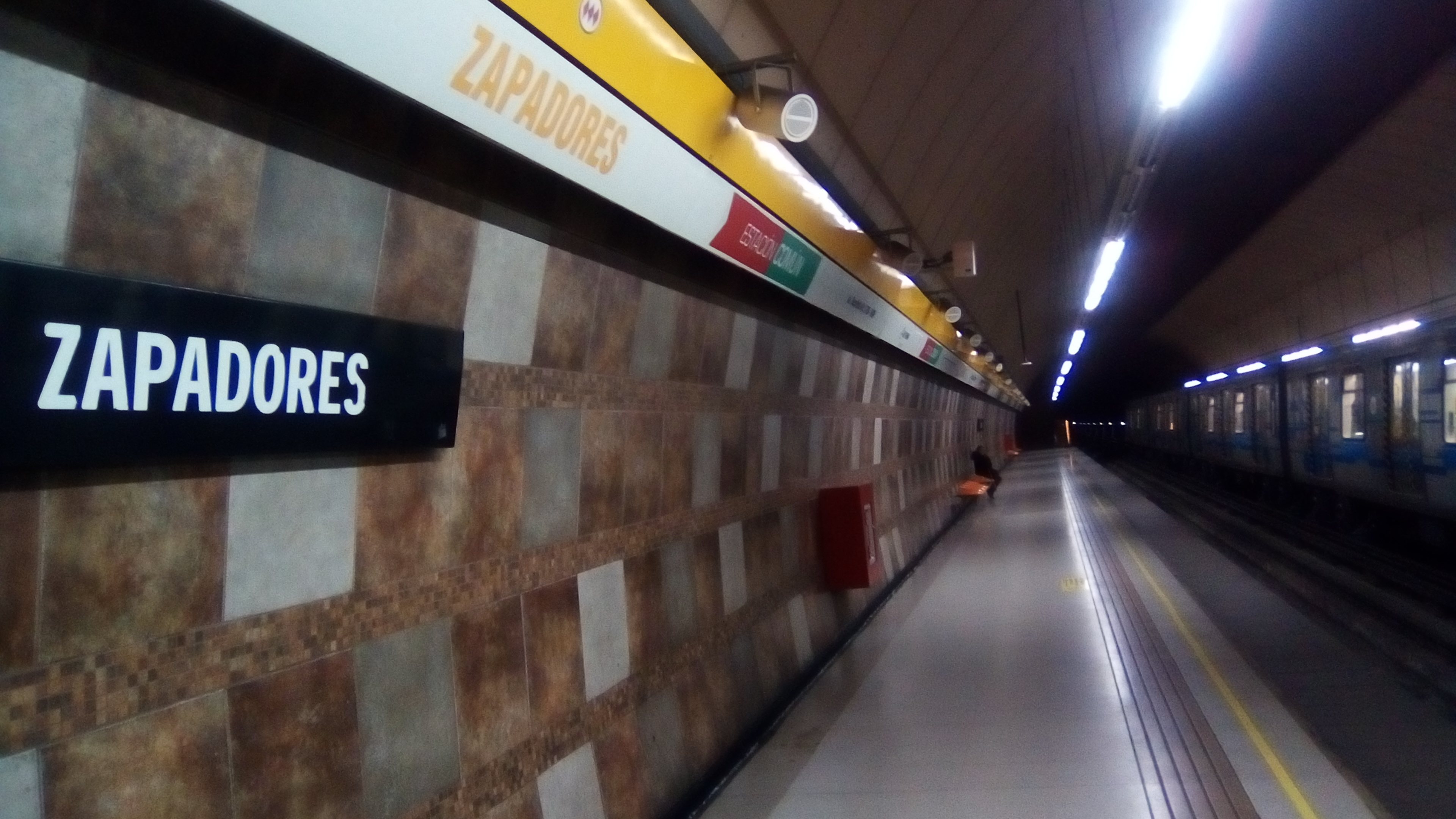 Estación Zapadores (2018), Foto de autoria propia